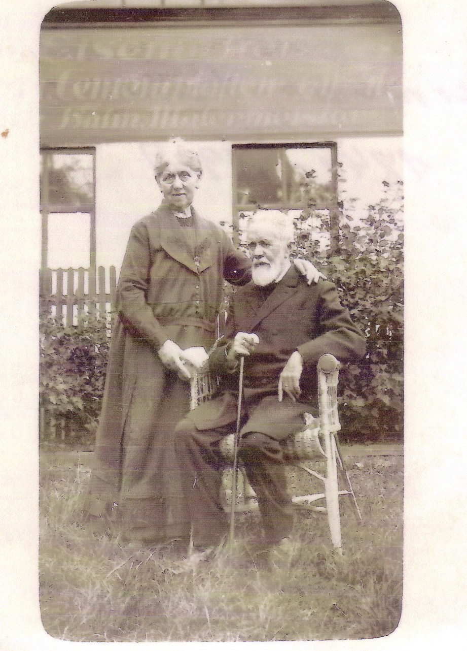 Hermann Hahn in seinen ende der 1920 Jahre mit seiner 2. Frau Caroline